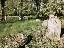 Židovský hřbitov Terešov